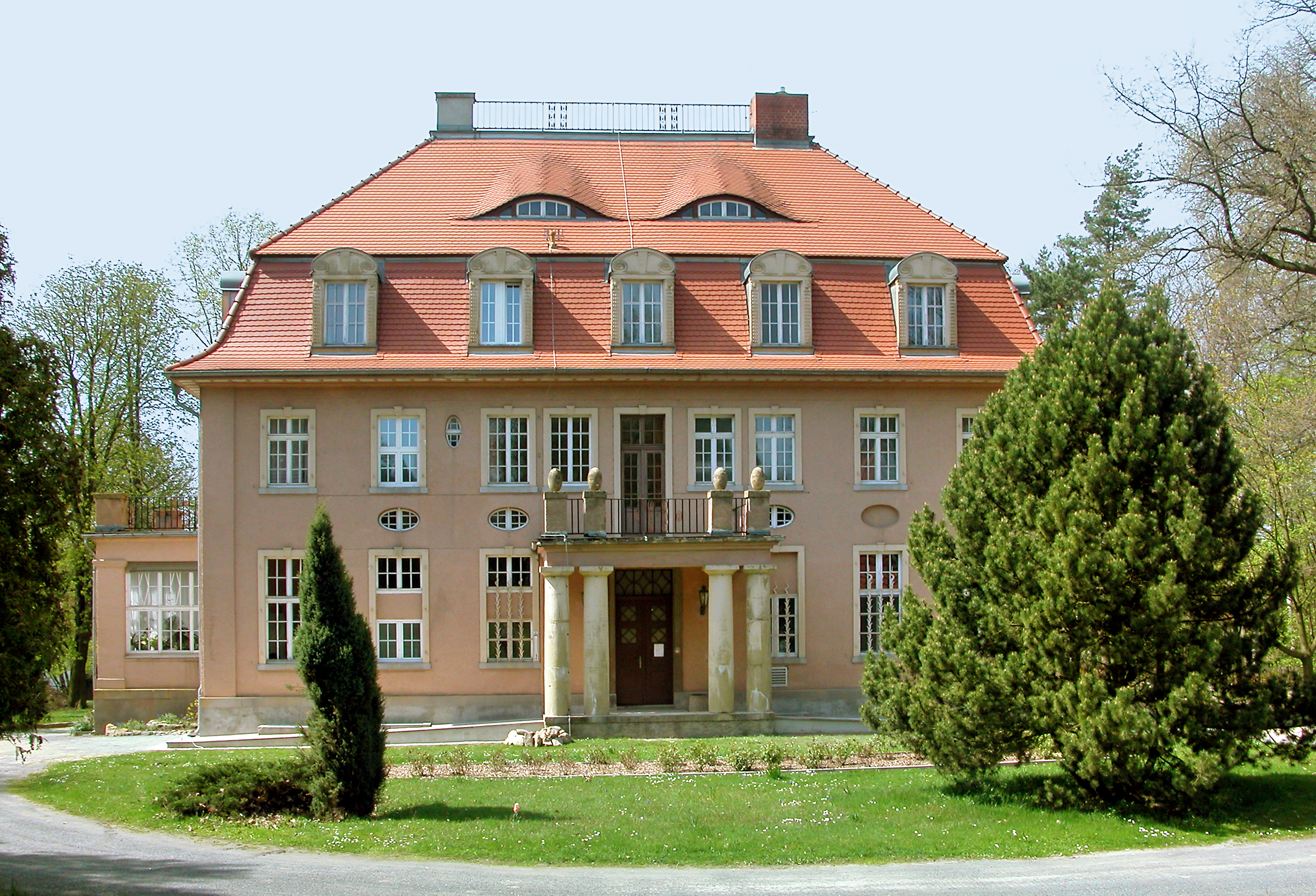 28.04.2008 02791 Oberoderwitz (Oderwitz), Zur Lindenallee 5: Schloß Oberoderwitz, erbaut 1909 bis 1911 unter Maximilian von Beschwitz. Bis 2012 Jugendherberge, danach Privatbesitz. (GMP: 50.968413,14.716150). Sicht von Osten, Hofseite. [DSCN325510.TIF]20080428390DR.JPG(c)Blobelt